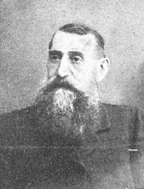 Retrato de Ángel García Rendueles por Manuel Compañy y recogido en la revista española Nuevo Mundo.